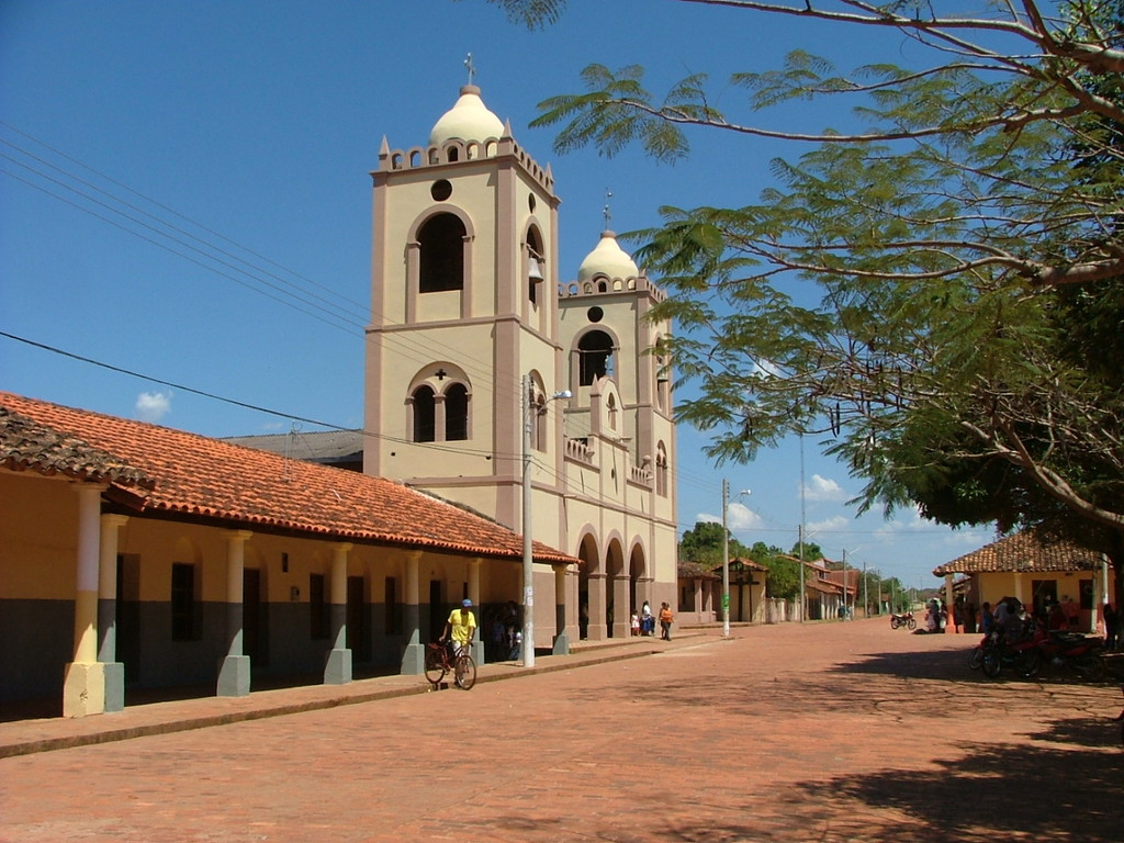 Iglesia de la localidad de San Joaquín en el Departamento del Beni, Bolivia.